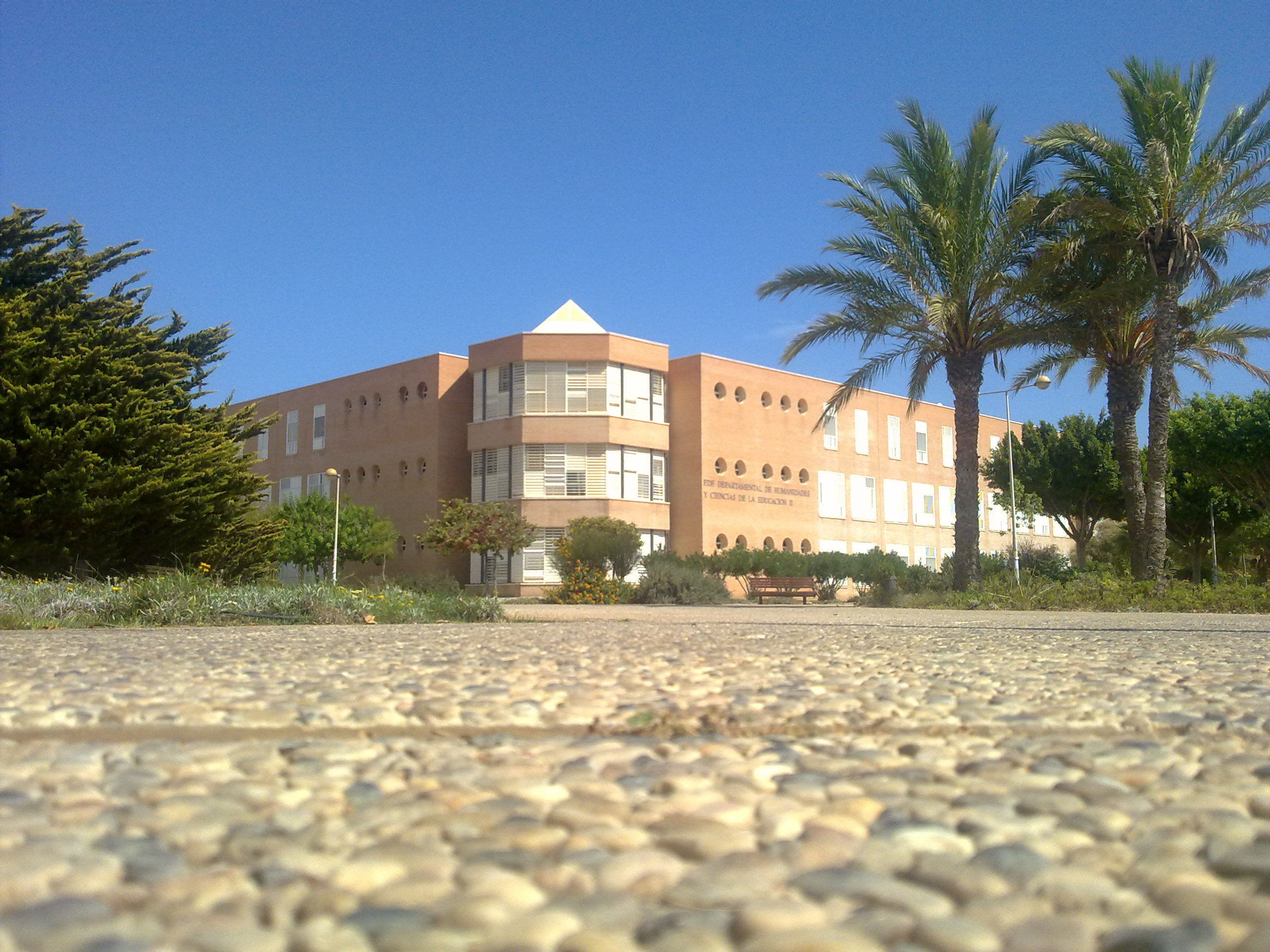 universidad almeria